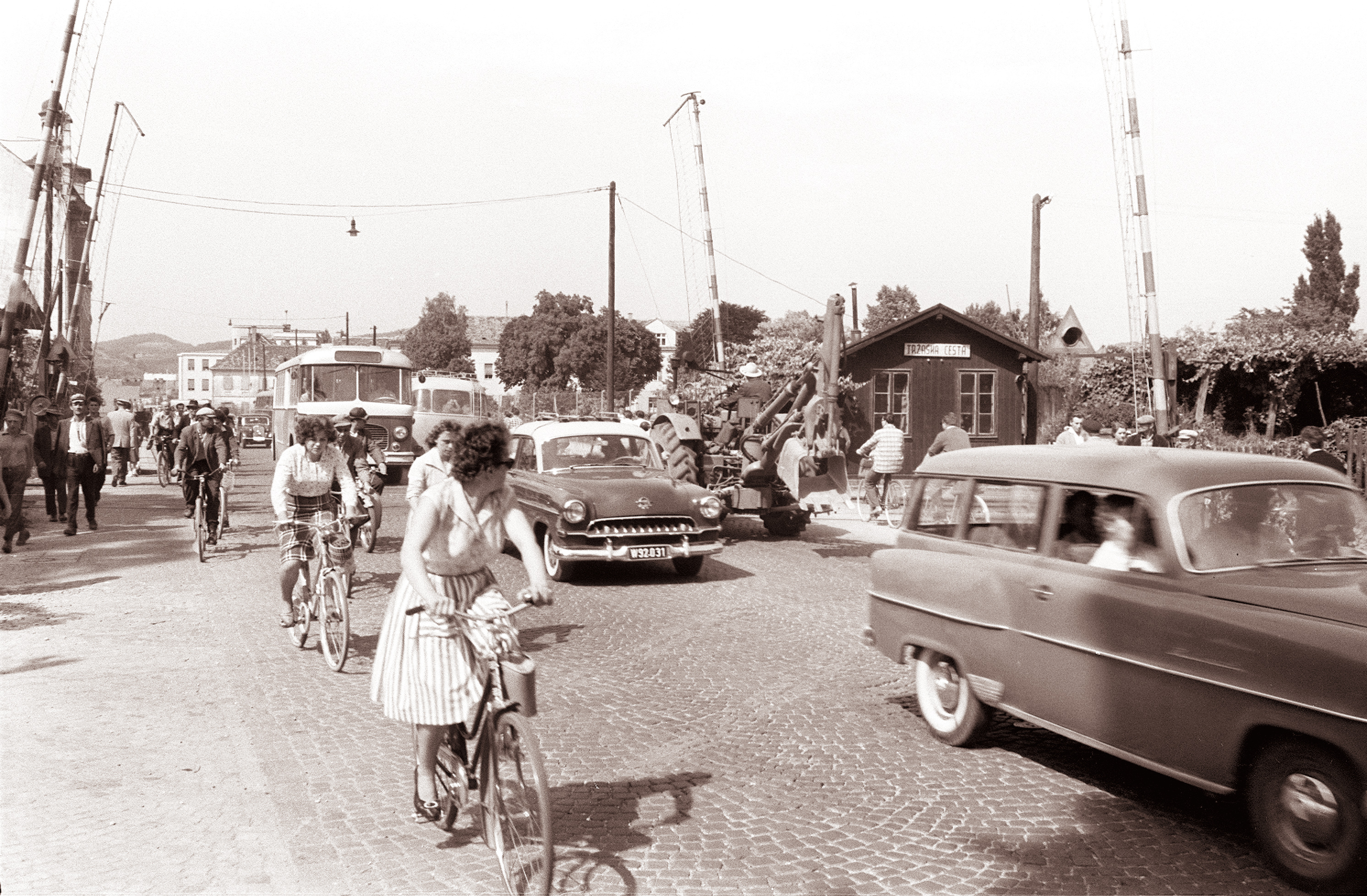 Kolesarji na Tržaški cesti